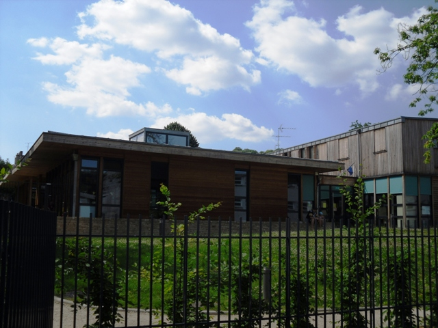 L'école maternelle des Eaux-Vives à Bièvres (91)